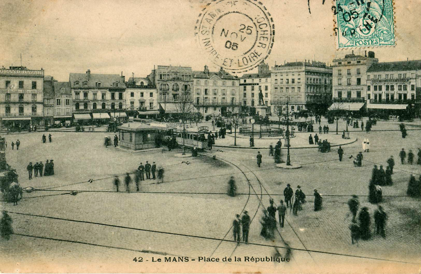 Carte postale ancienne, sans mention d'éditeur, n°42 : LE MANS